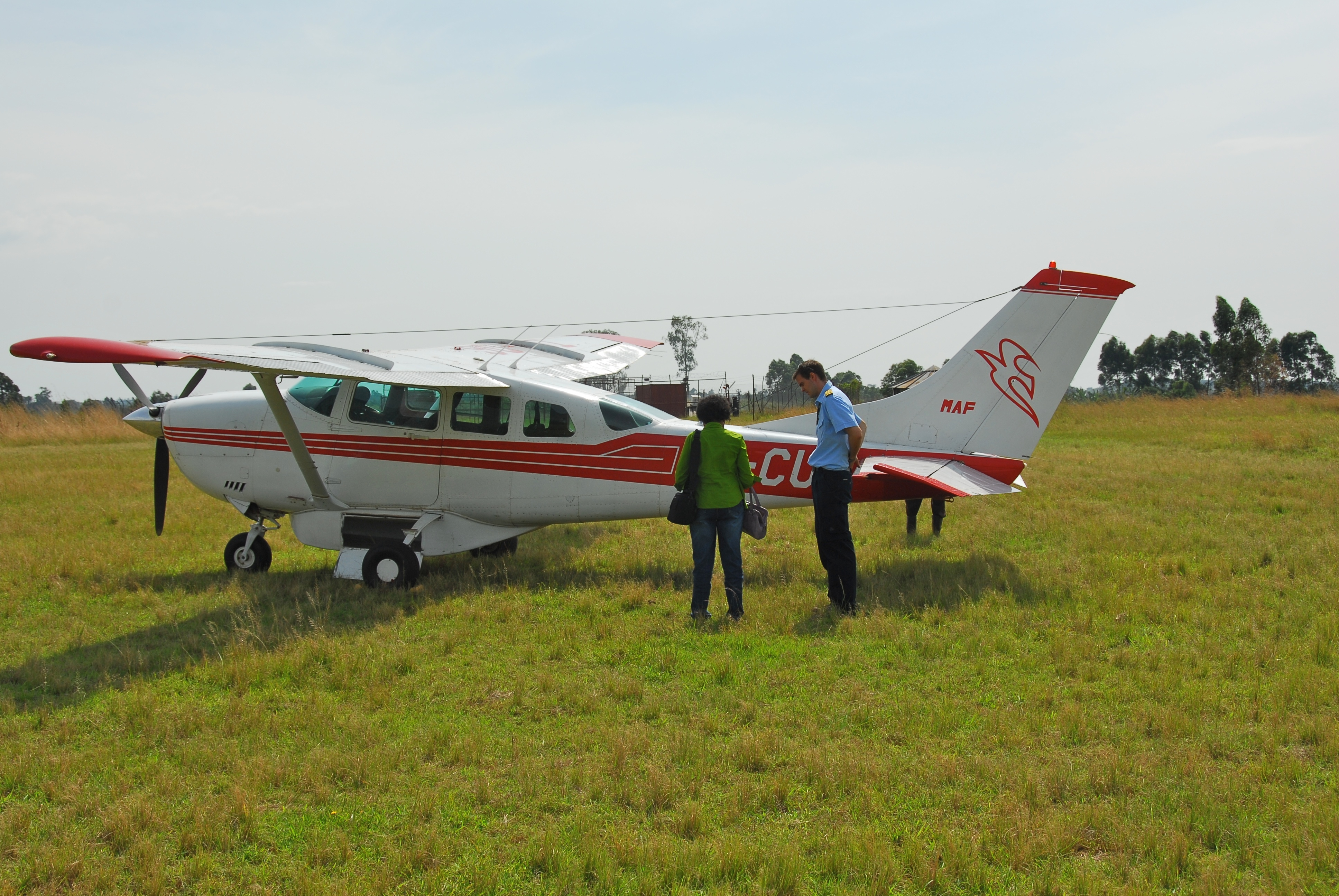 Fort Portal airport